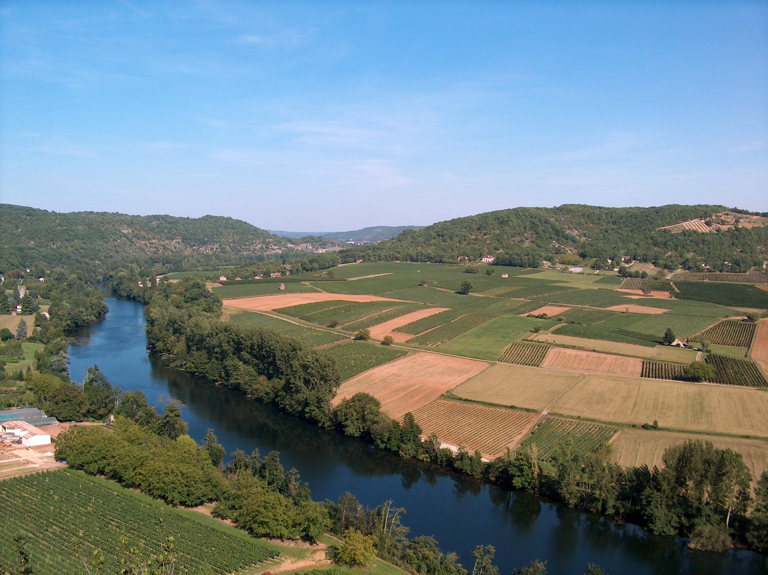 Vignoble du Cahors dans la vallée du Lot. Vue d'une colline de la rive droite. Les vignobles de Cahors sont sur la rive gauche du Lot entre Albas et Luzech. On voit sur la rive droite des rangées de vignes également autour des pépinières Passedat.